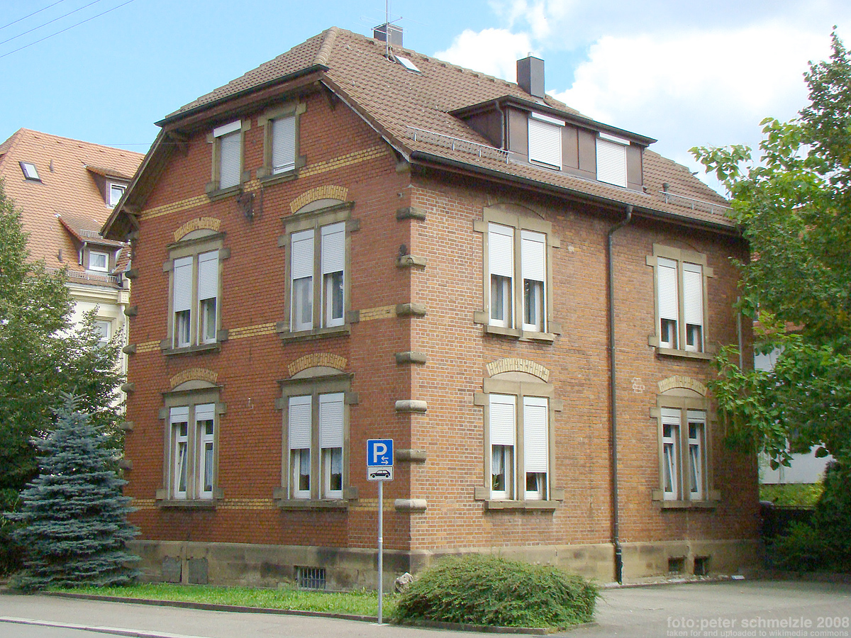 Denkmalgeschütztes Gebäude Kolpingstr. 16 in Heilbronn-Sontheim